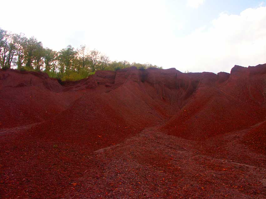 Le Roste (Comune di Monieri, Grosseto). L'area delle Roste, lungo il fiume Merse e visibile dalla strada che collega Massa Marittima con Siena, raccoglie i resti delle lavorazioni del rame a partire dalla fine del XIX, inizi del XX secolo, avvenute con il metodo Conedera.